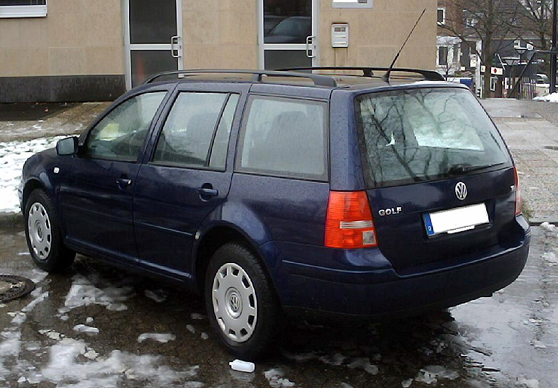 Das Bild zeigt einen VW Golf Variant.